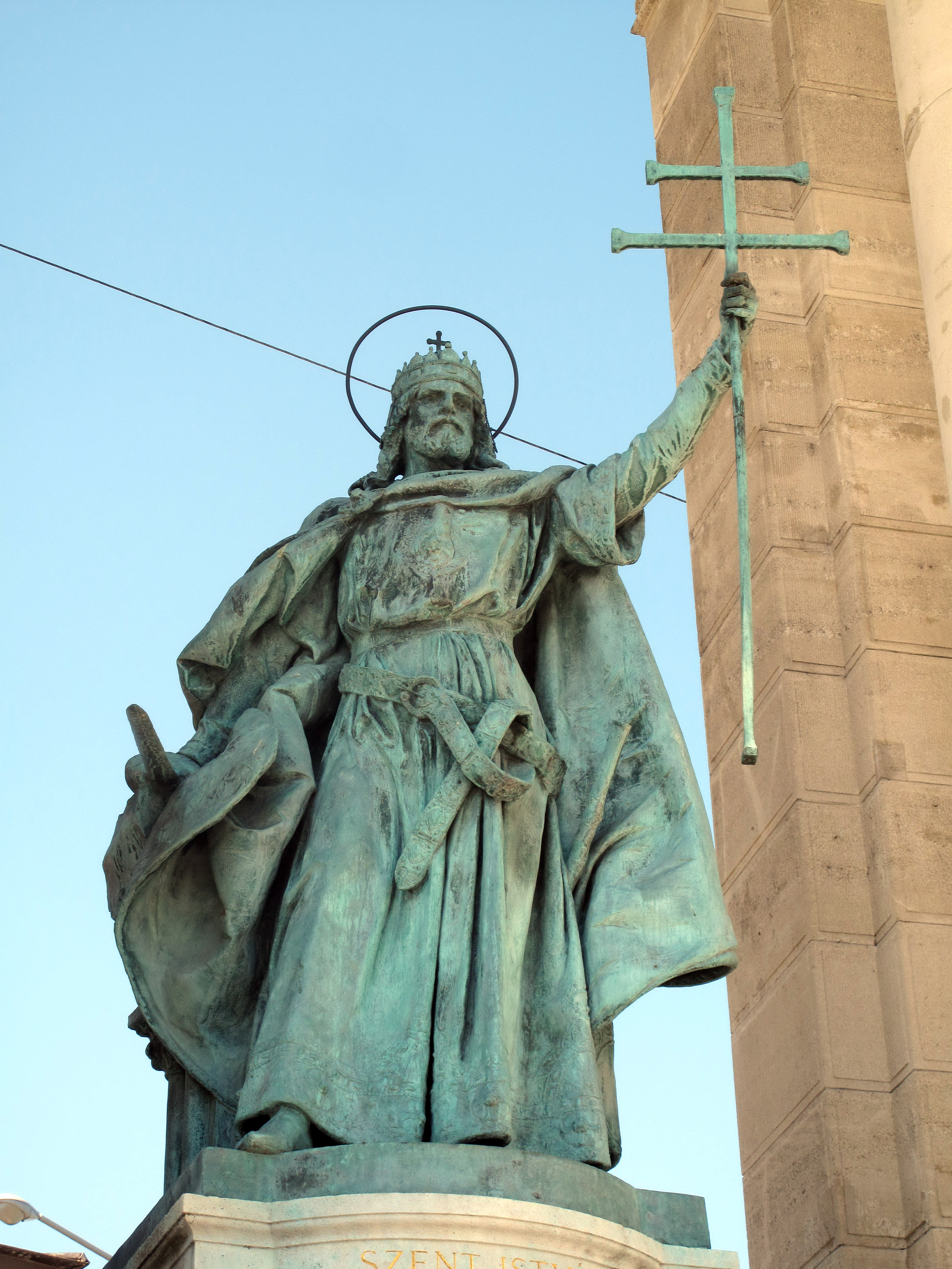 Náměstí Hrdinů, Budapešť